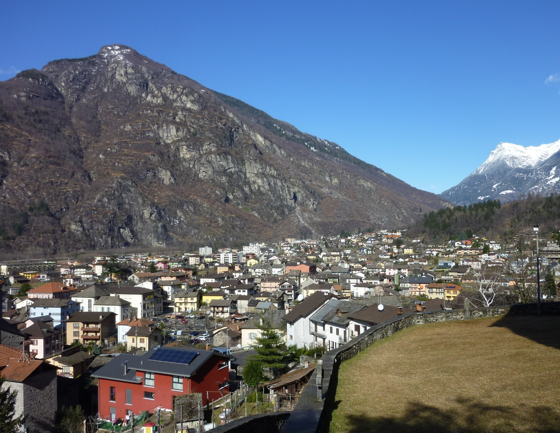 Biasca Richtung NE